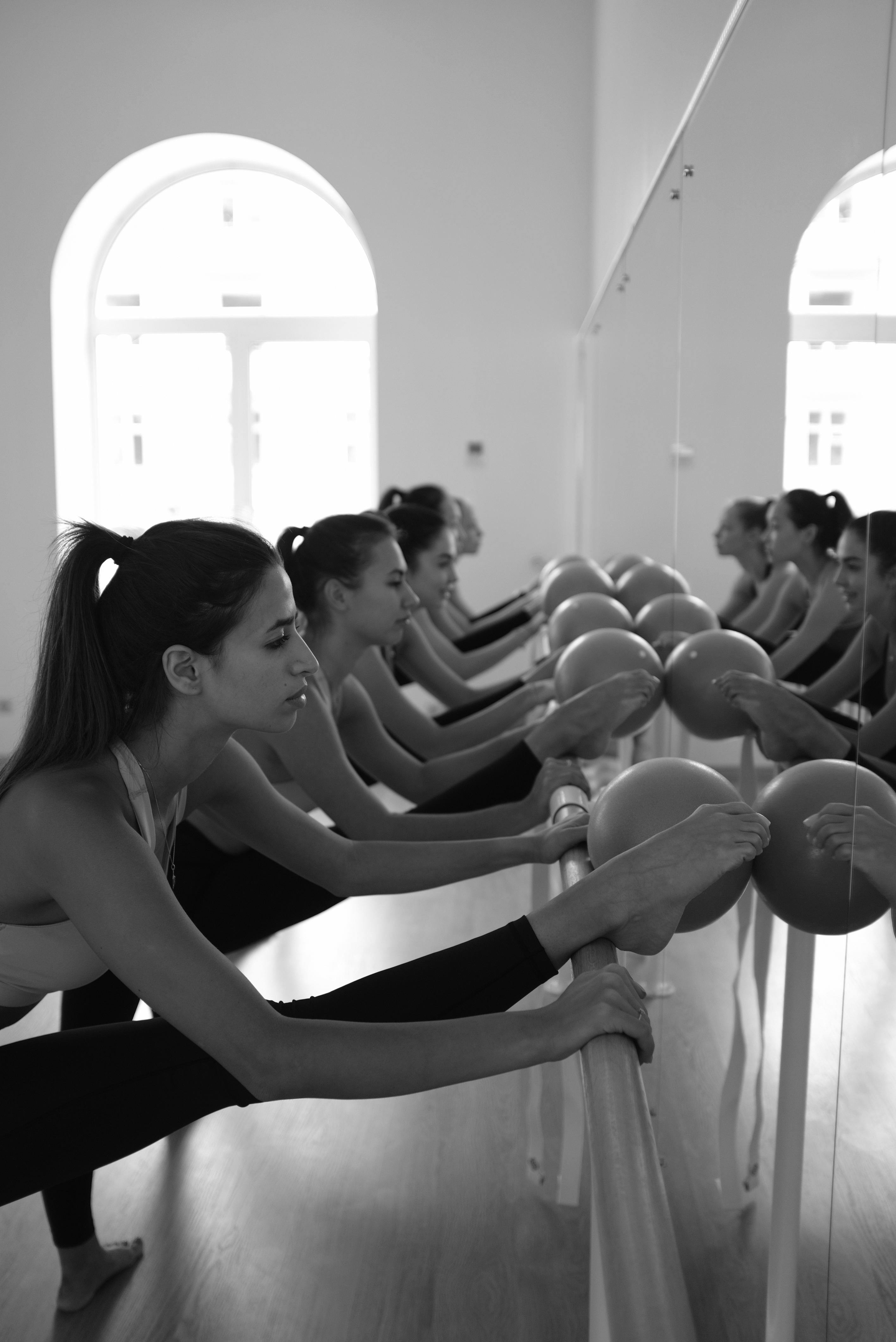 Barre в SM Stretching